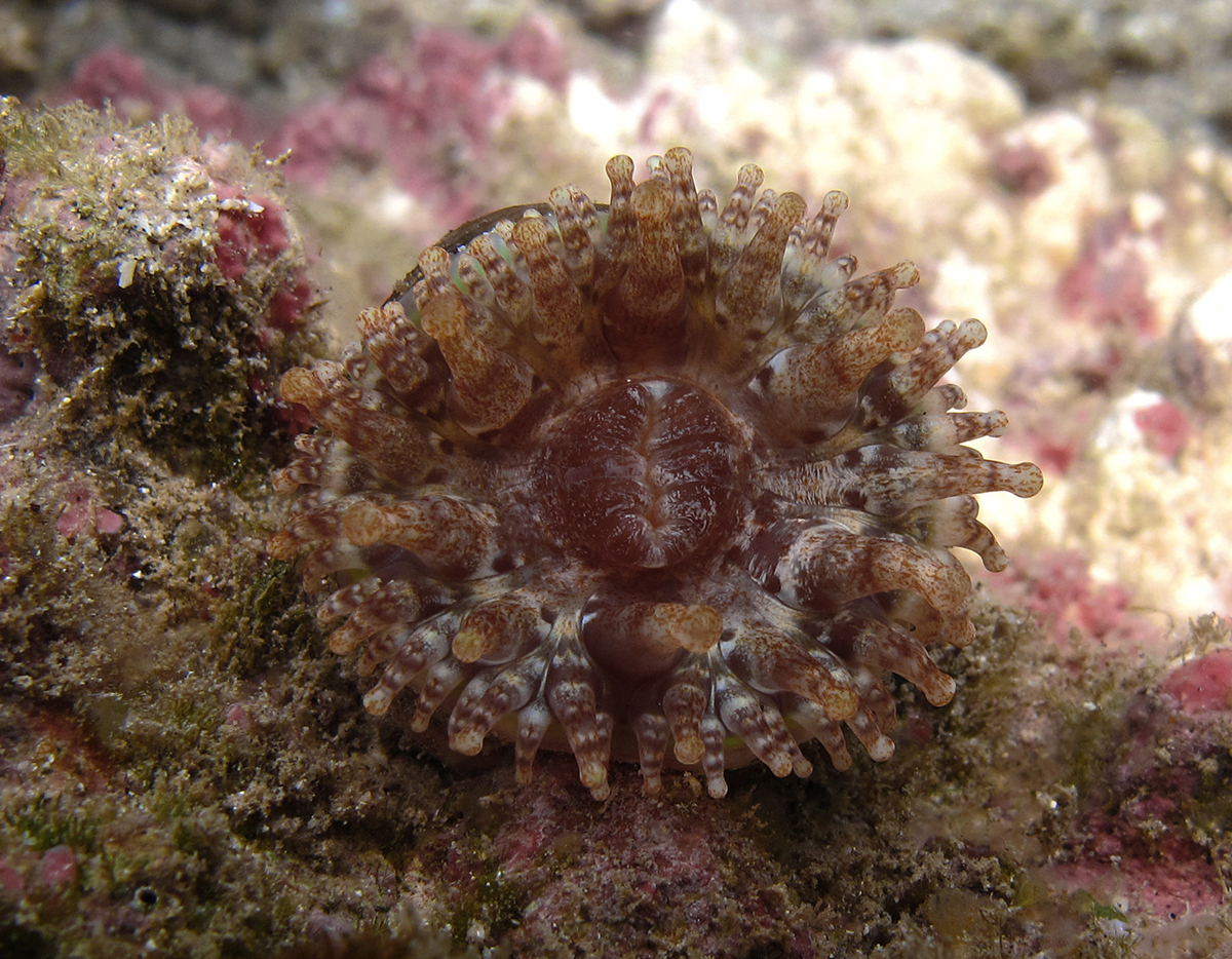 Une anémone Telmatactis decora à la Réunion.